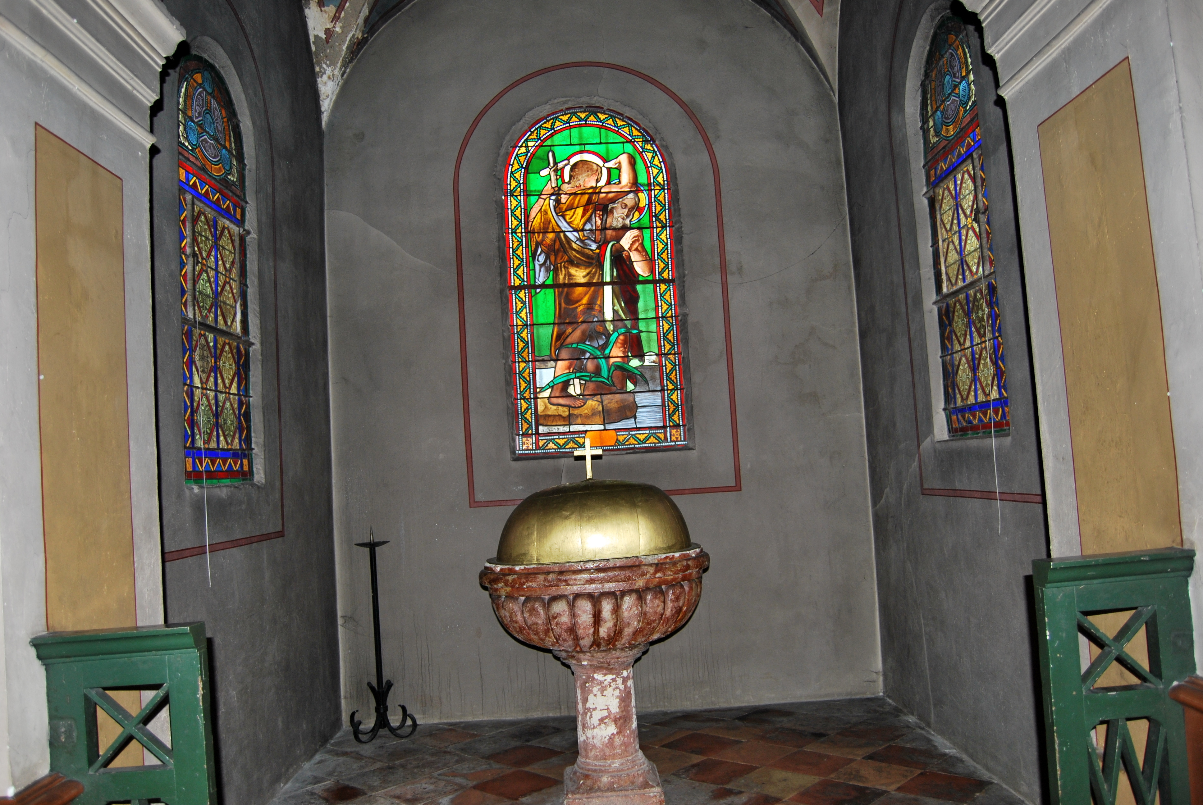 Ambares-et-Lagrave (Gironde) église St Pierre